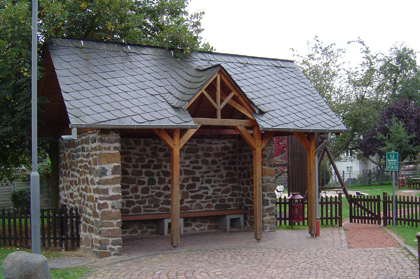 Das Buswartehaus mit Spielplatz in Steinsberg, Rhein-Lahn-Kreis, Rheinland-Pfalz